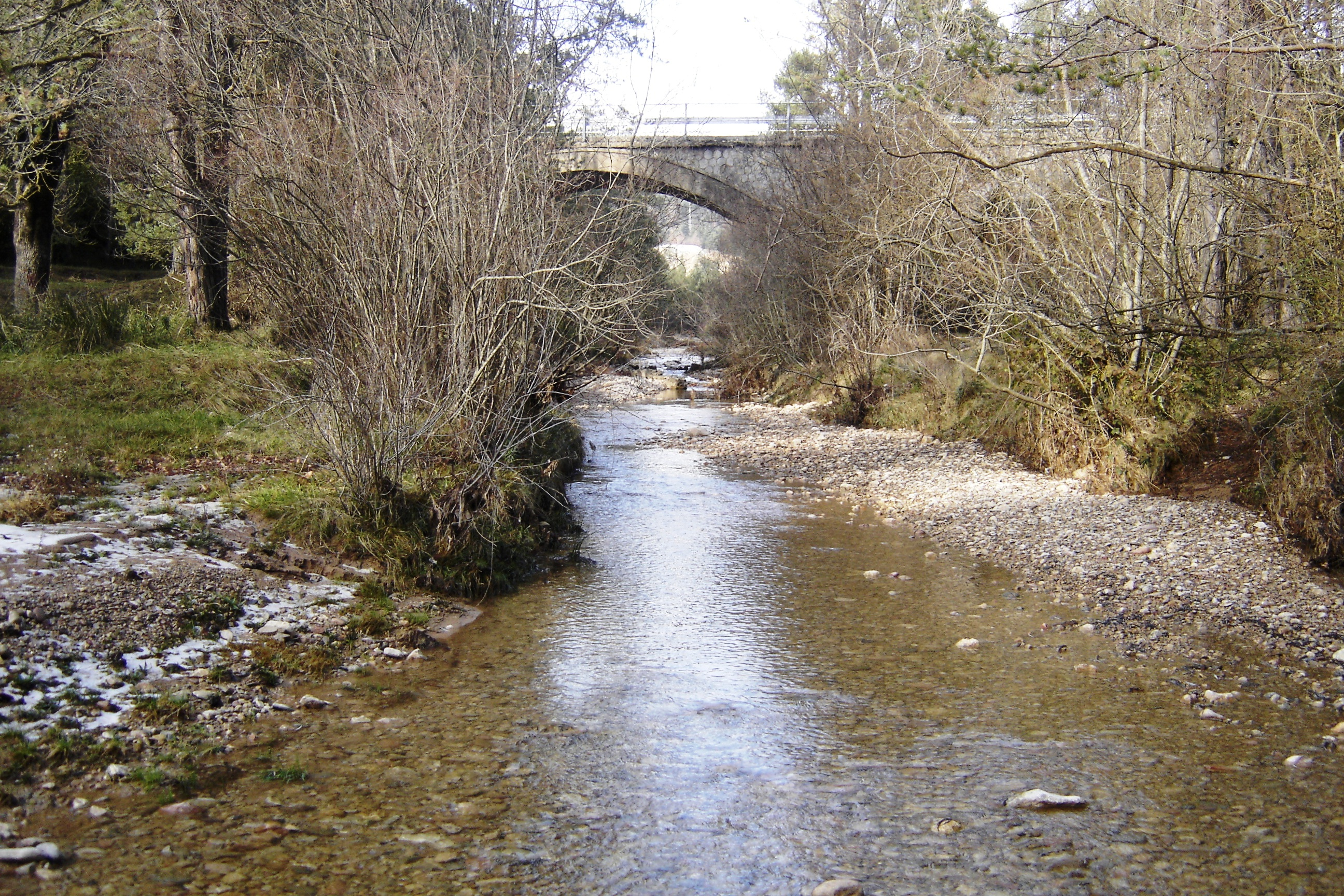 L'Aigua de Llinars després de travessar la carretera de Berga a Sant Llorenç de Morunys per sota el pont de Ca n'Espigard i a punt de confluir amb el Riu del Coll de Jouet i passar a denominar-se l'Aigua d'Ora.